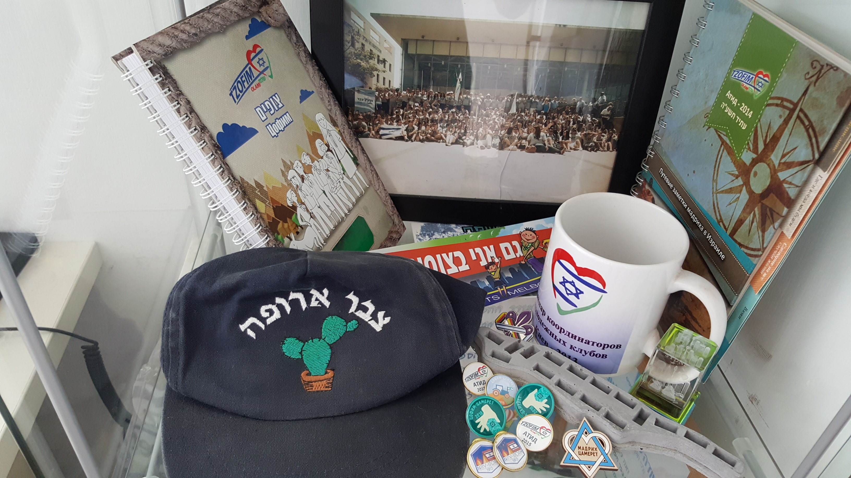 פריטי ארכיון במטה צופי צבר בתל-אביב